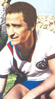 José Sanfilippo Jugando para San Lorenzo en 1972